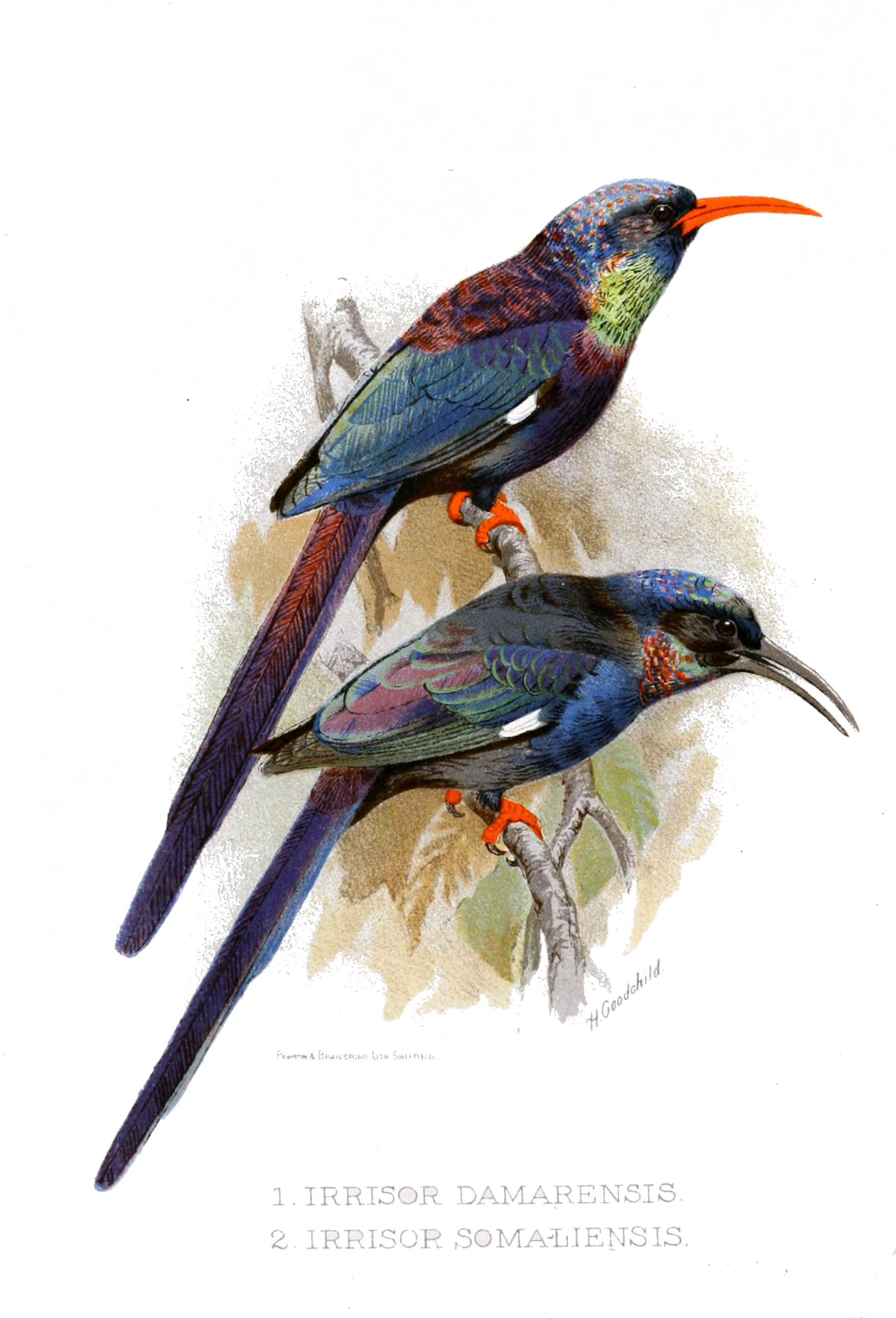 Irrisor damarensis = Phoeniculus damarensis Irrisor somaliensis = Phoeniculus somaliensis